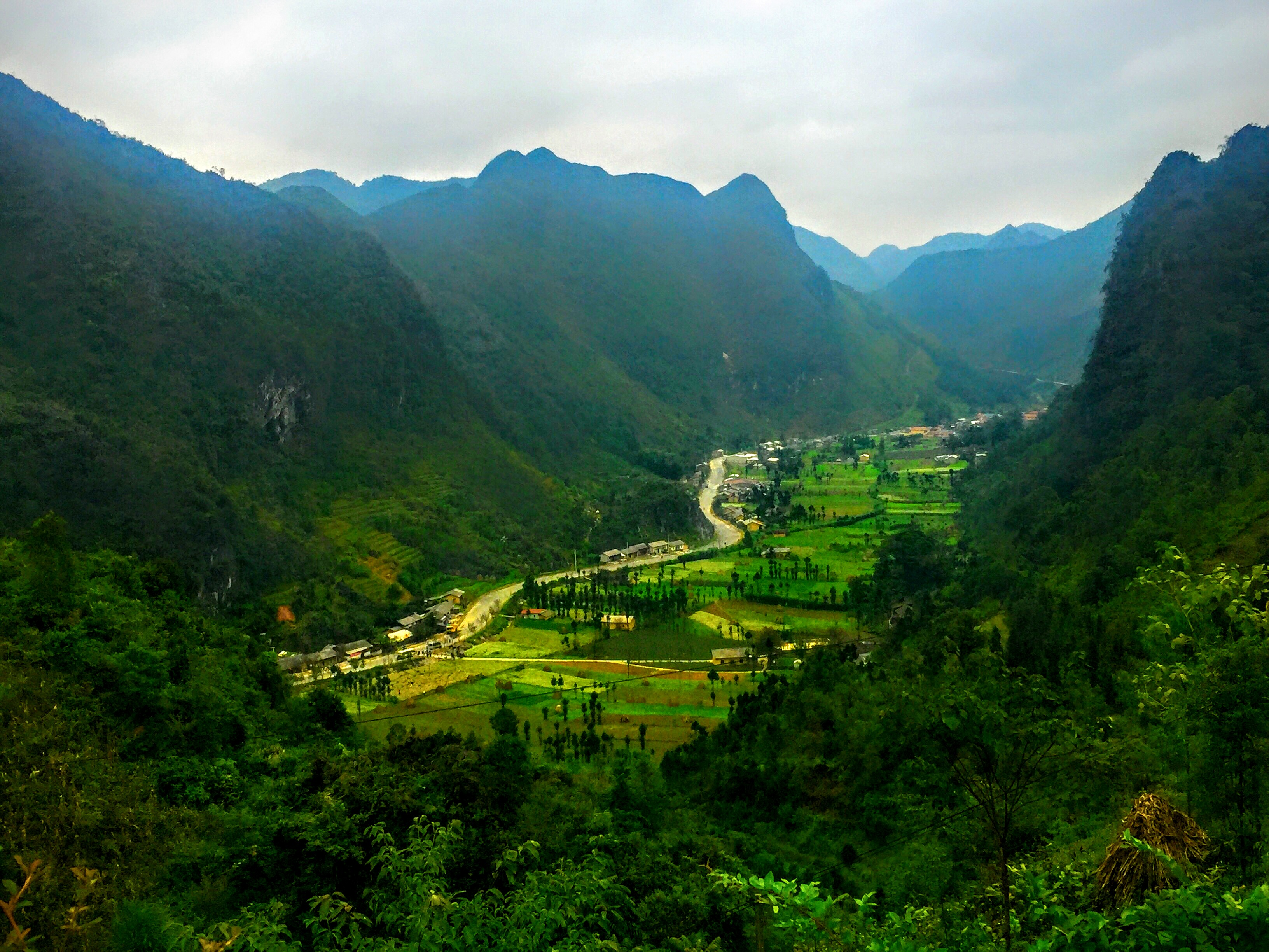 Sủng Là, Đồng Văn, Hà Giang, Vietnam